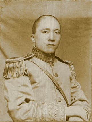 北京政府軍時代の楊虎城。